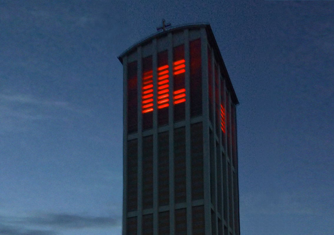 Skalen, permanente Lichtinstallation, Alleerheiligenkirche Frankfurt am Main, 2015